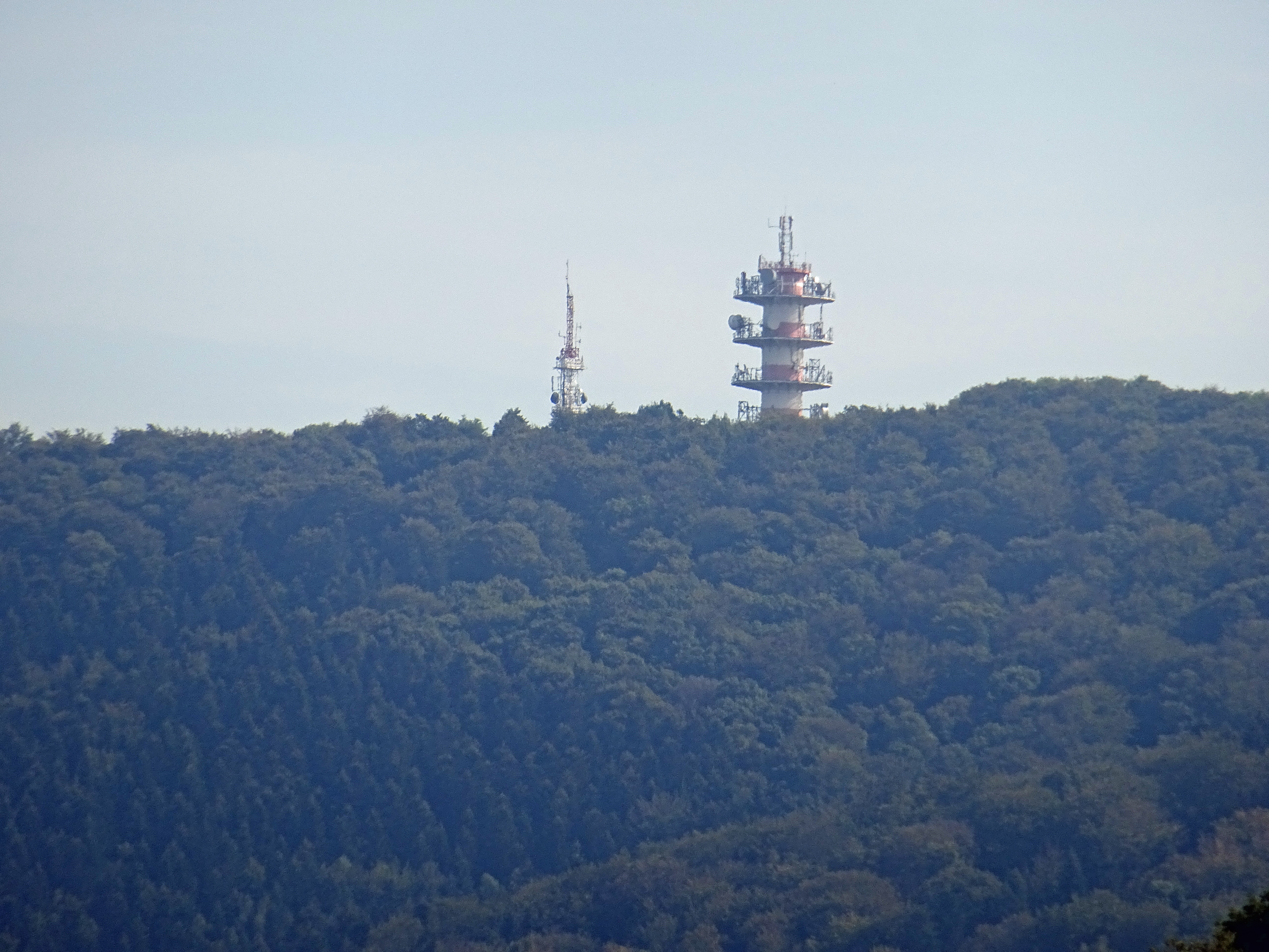 Le sommet du Salber.